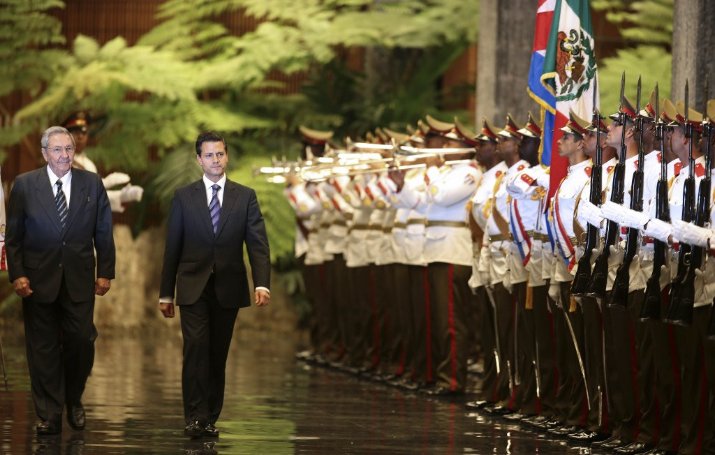 Recepción oficial por parte de Raúl Castro, Presidente de Cuba. Palacio de la Revolución. La Habana, Cuba. 29 de enero de 2014.